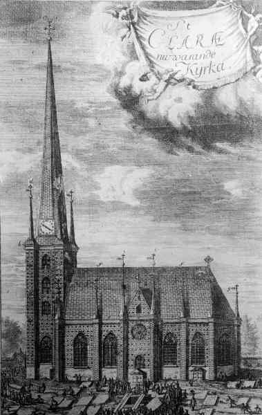 Kyrkan mot söder. Foto efter stick, 1727. Kategori: (01) Exteriörer Kyrkan mot söder. Foto efter stick, 1727.